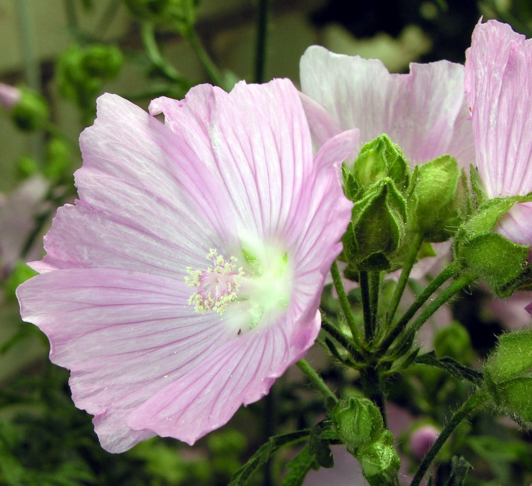 Aukštoji dedešva (Malva alcea), žiedai Šeima. Dedešviniai (Malvaceae) Foto: Algirdas, 2006 m. liepos 16 d., Lietuva